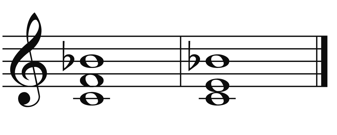 accord de quarte/7e suspendue